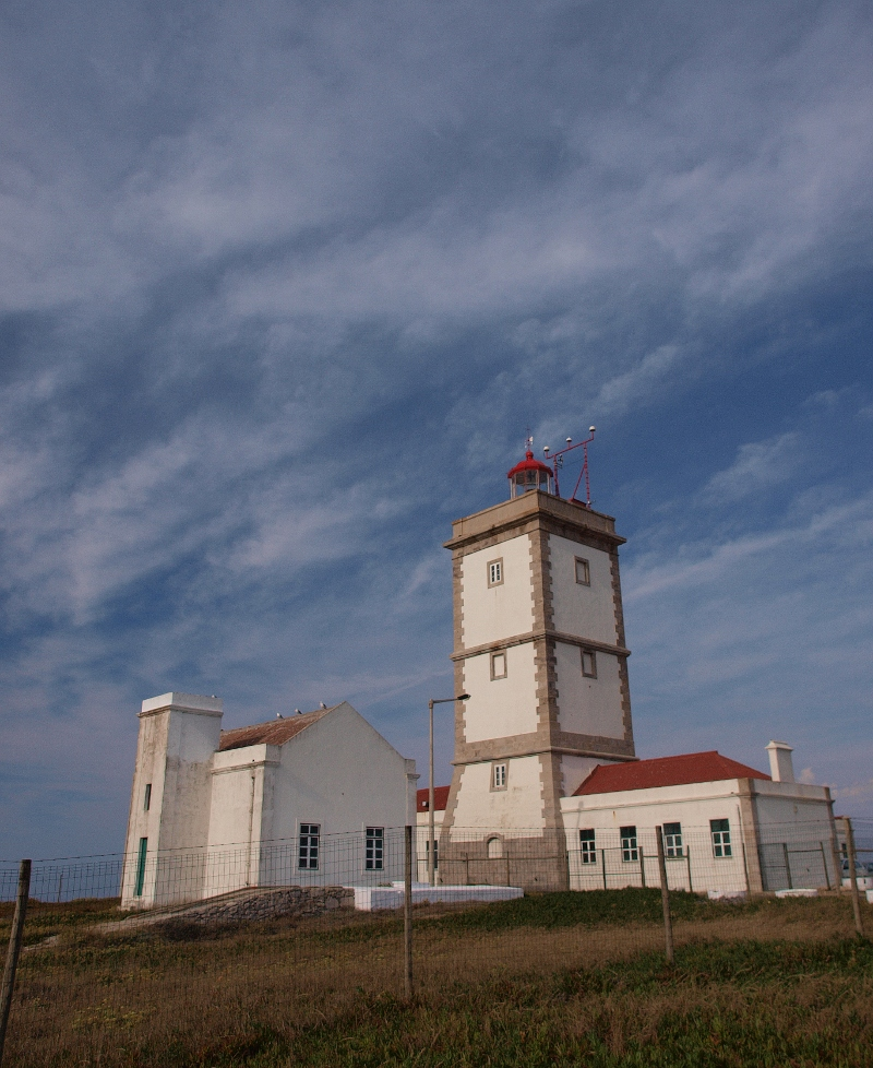 Farol do Cabo Carvoeiro, Peniche, Portugal